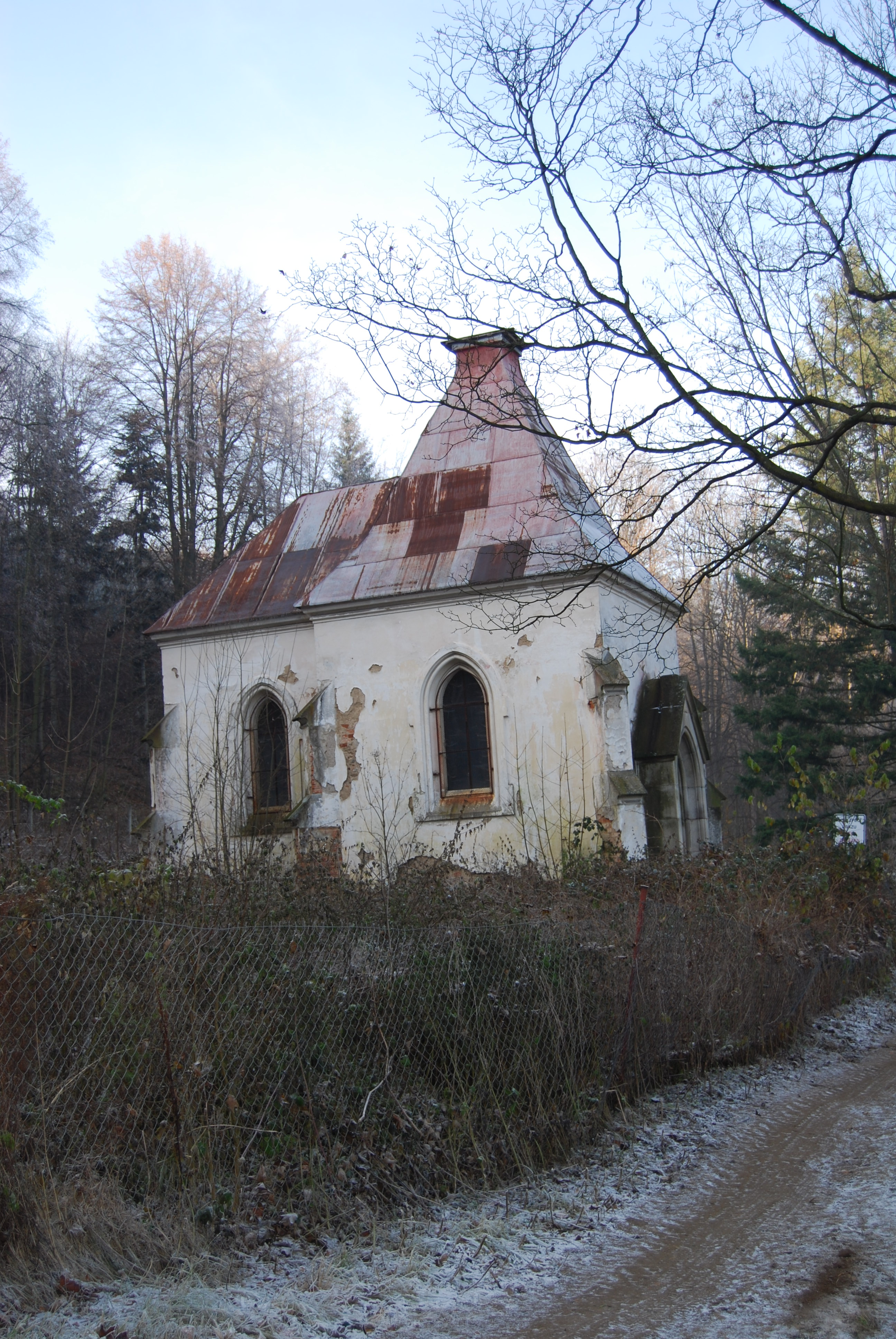 Spodní kaple. Lázně svaté Markéty. Základní sídelní jednotka města Prachatice. Okres Prachatice. Česko.